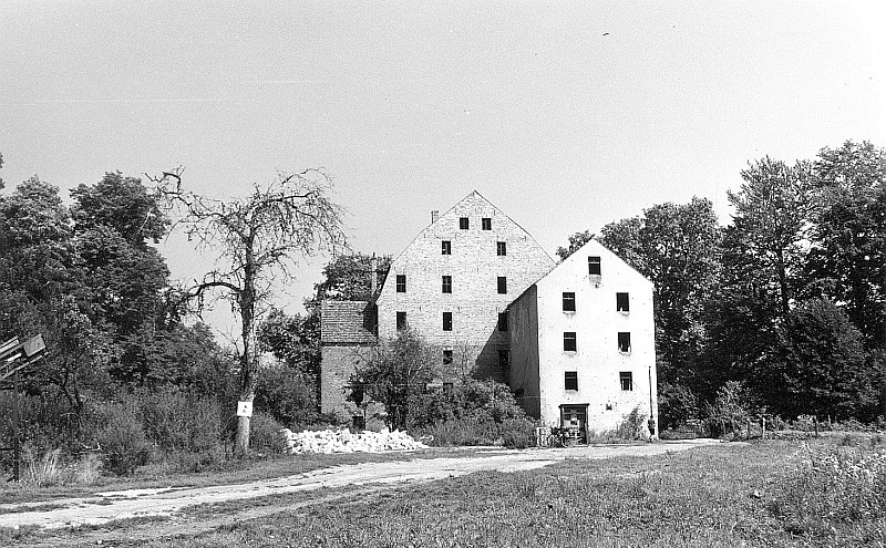 Original image description from the Deutsche Fotothek Quitzdorf am See-Horscha. Ehem. Mühle